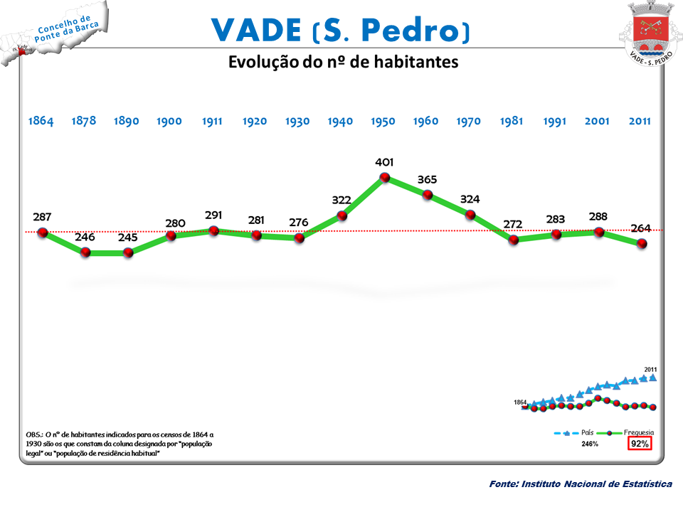 Censos 1864/2011